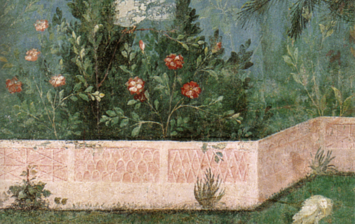 Villa di livia, affreschi di giardino, parete corta meridionale 04